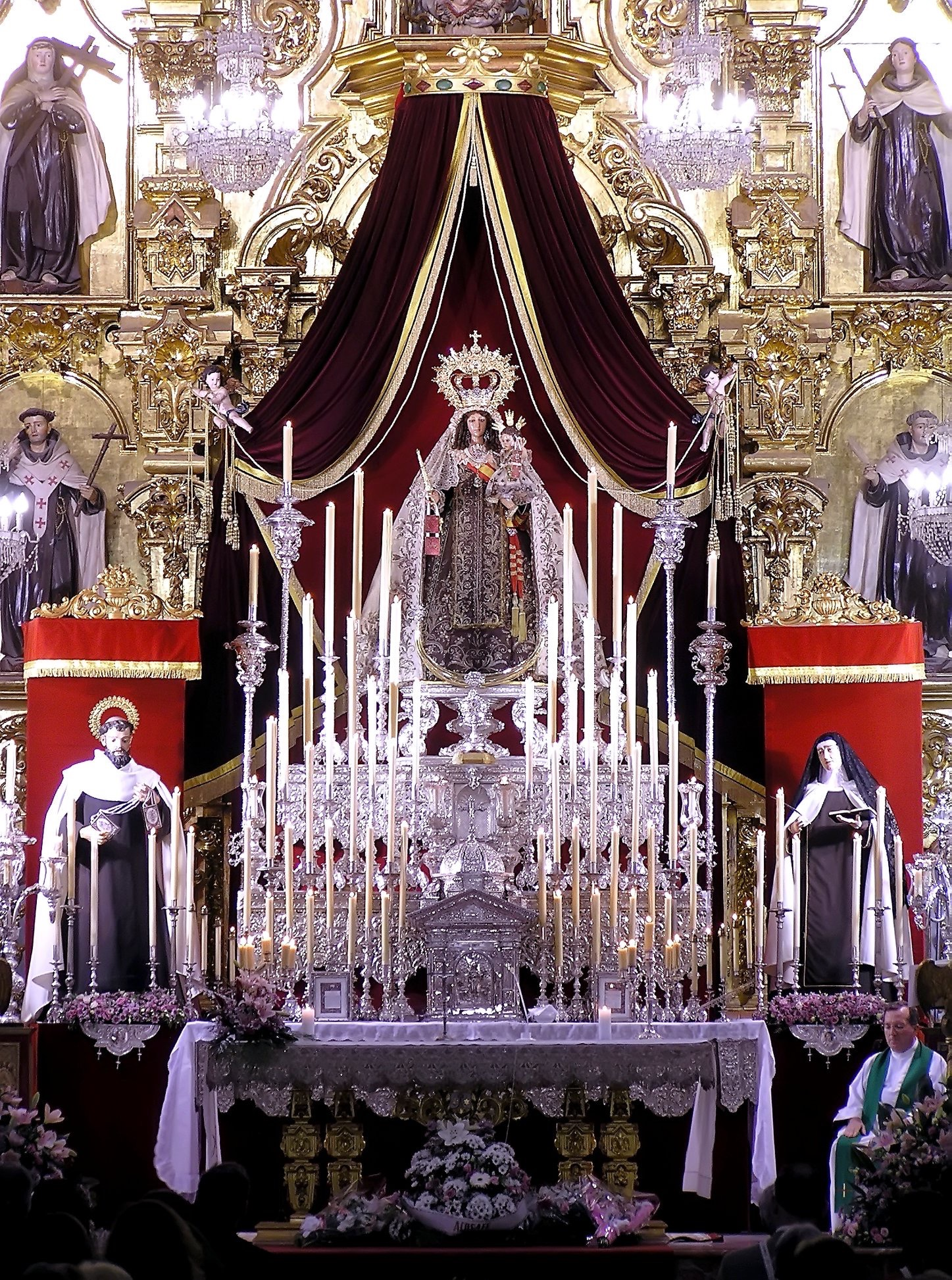 novena 3